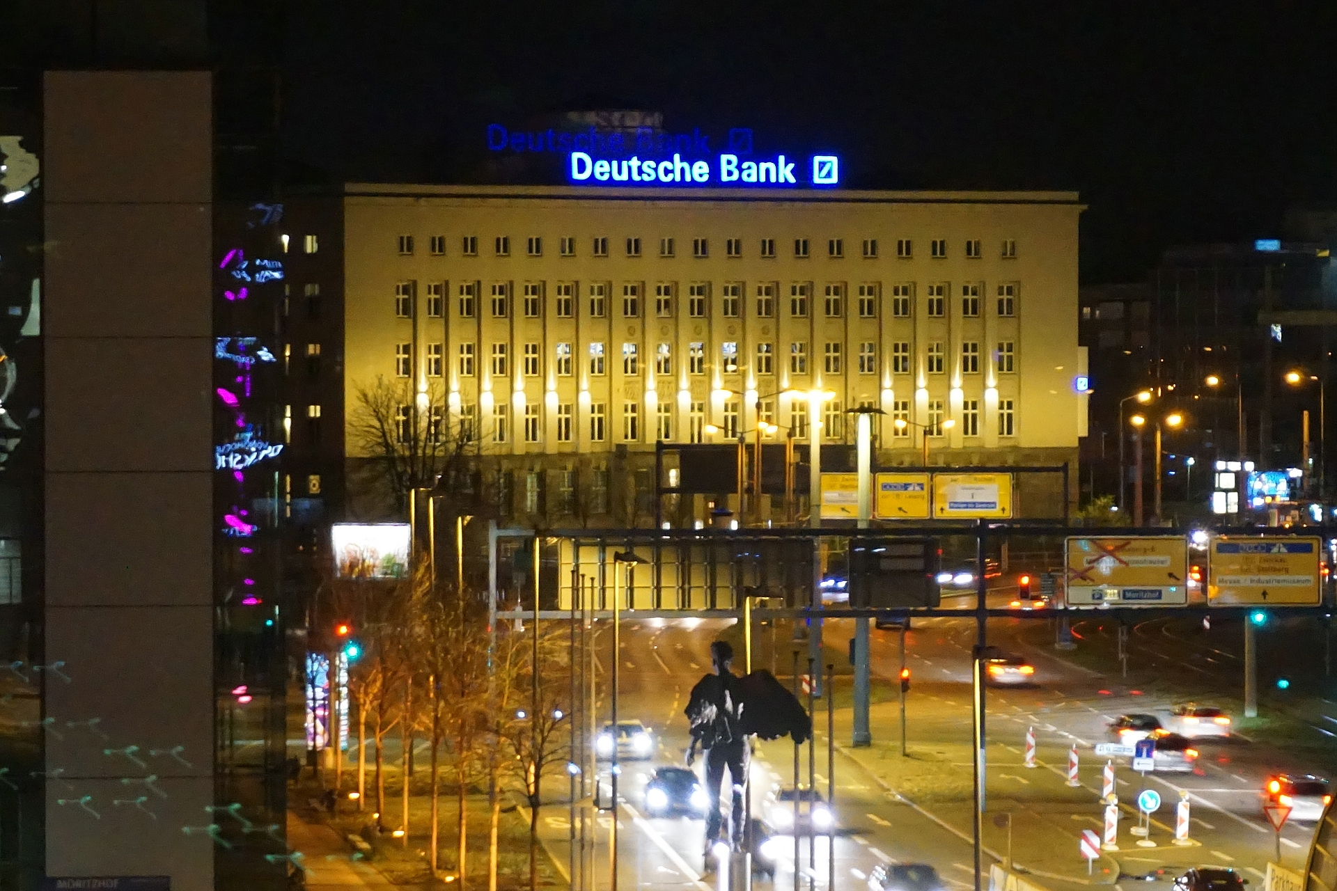 Das nach einem Entwurf des Architekten Erich Basarke von 1921 - 1926 gebaute Bankgebäude der Deutschen Bank AG am Falkeplatz in Chemnitz